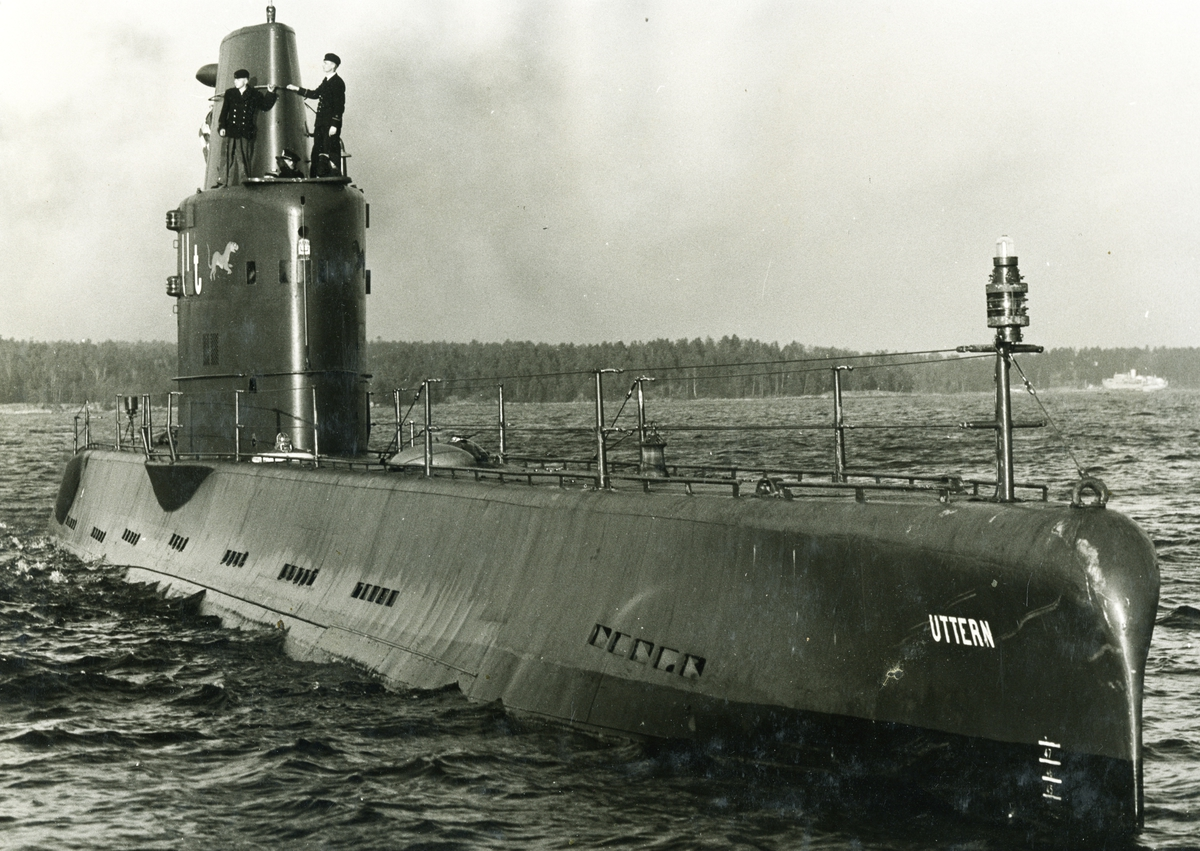 Den svenska ubåten HMS Uttern